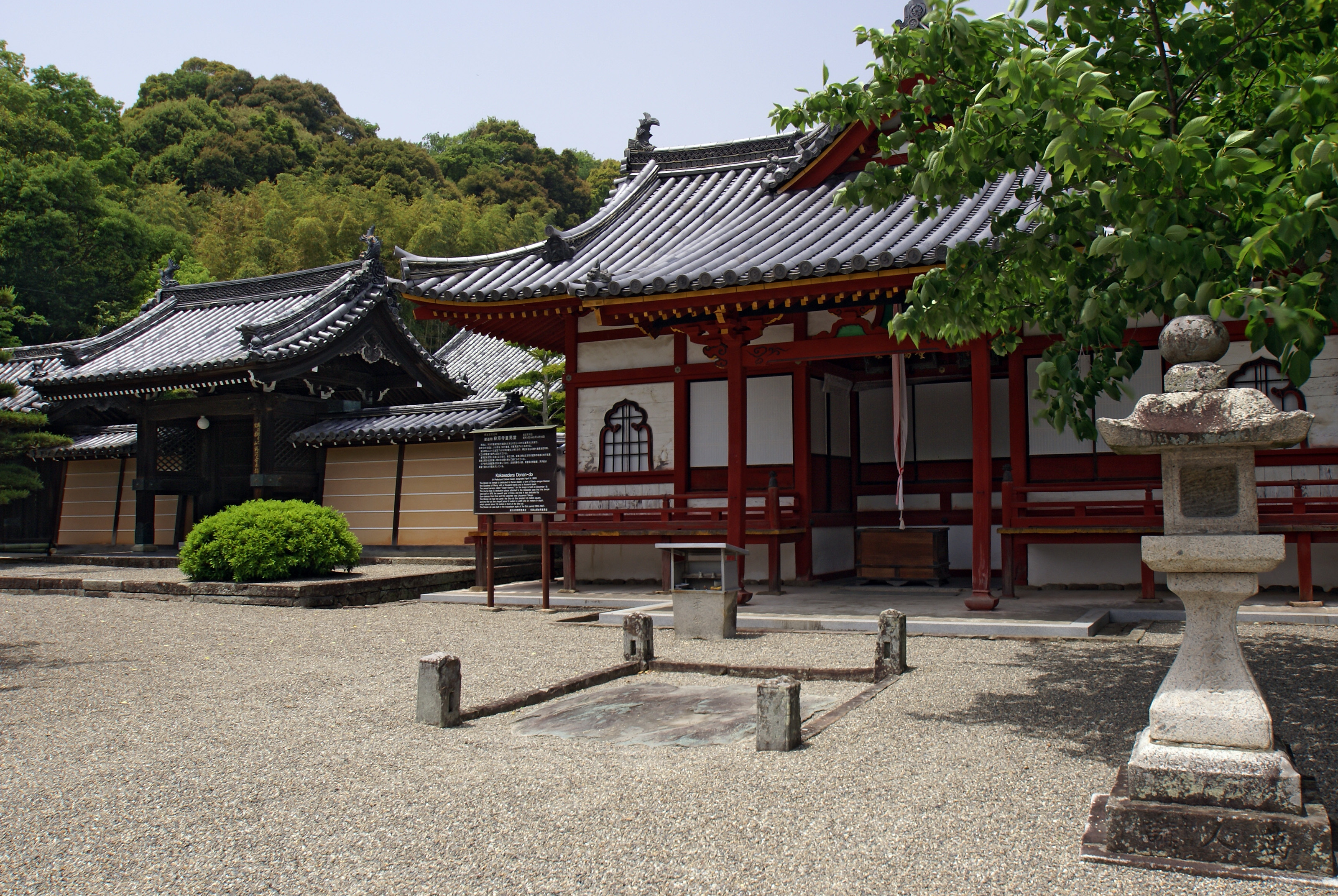 Kokawa-dera in Kinokawa, Wakayama prefecture, Japan